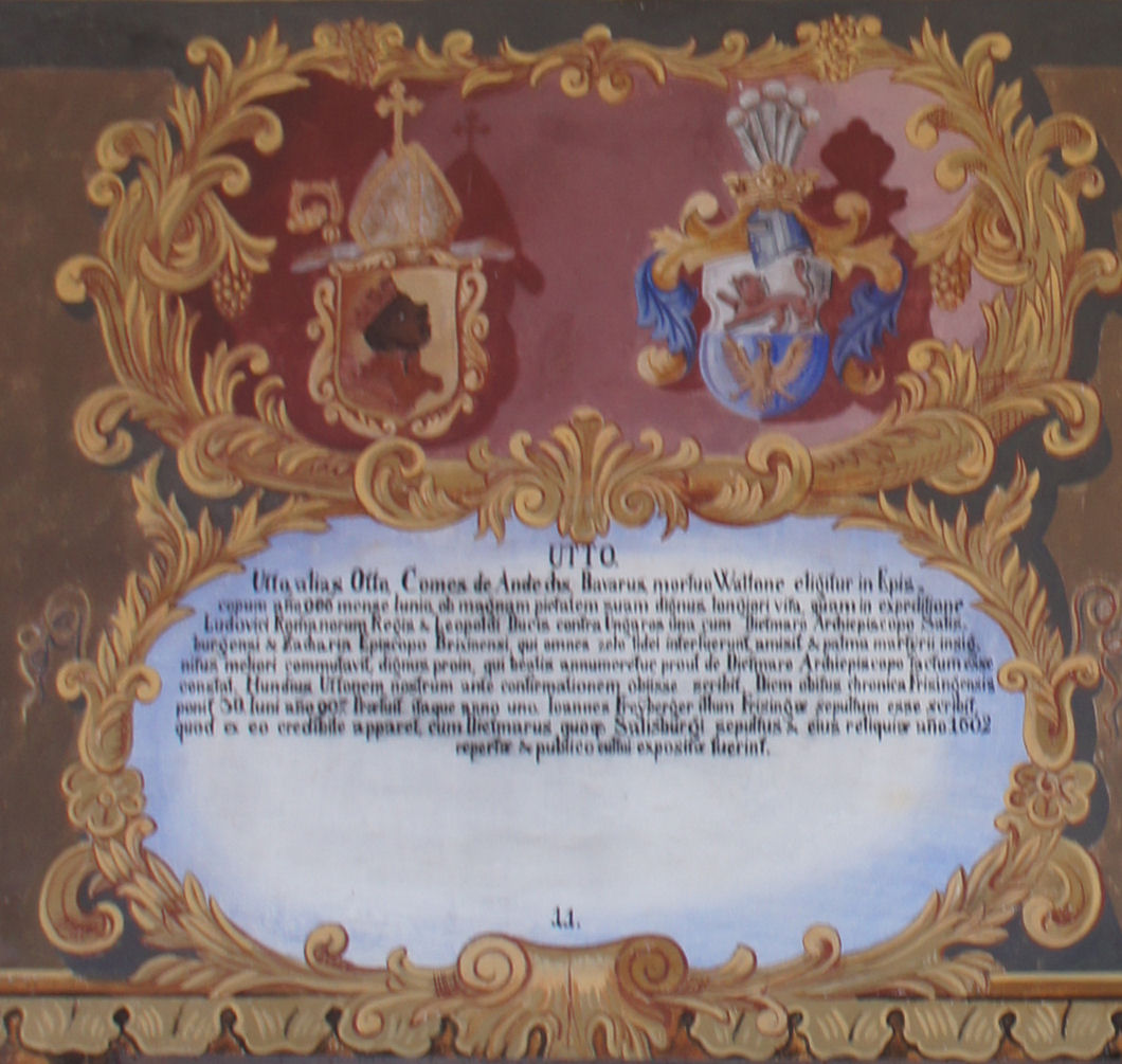 Wappentafel von Utto, Bischof von Freising, im Fürstengang zwischen Fürstbischöflicher Residenz und Freisinger Dom. Links das geistliche, rechts das persönliche Wappen, darunter ein lateinischer Text mit kurzer Biographie.